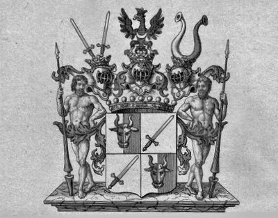 Herb hrabiow Czettritz